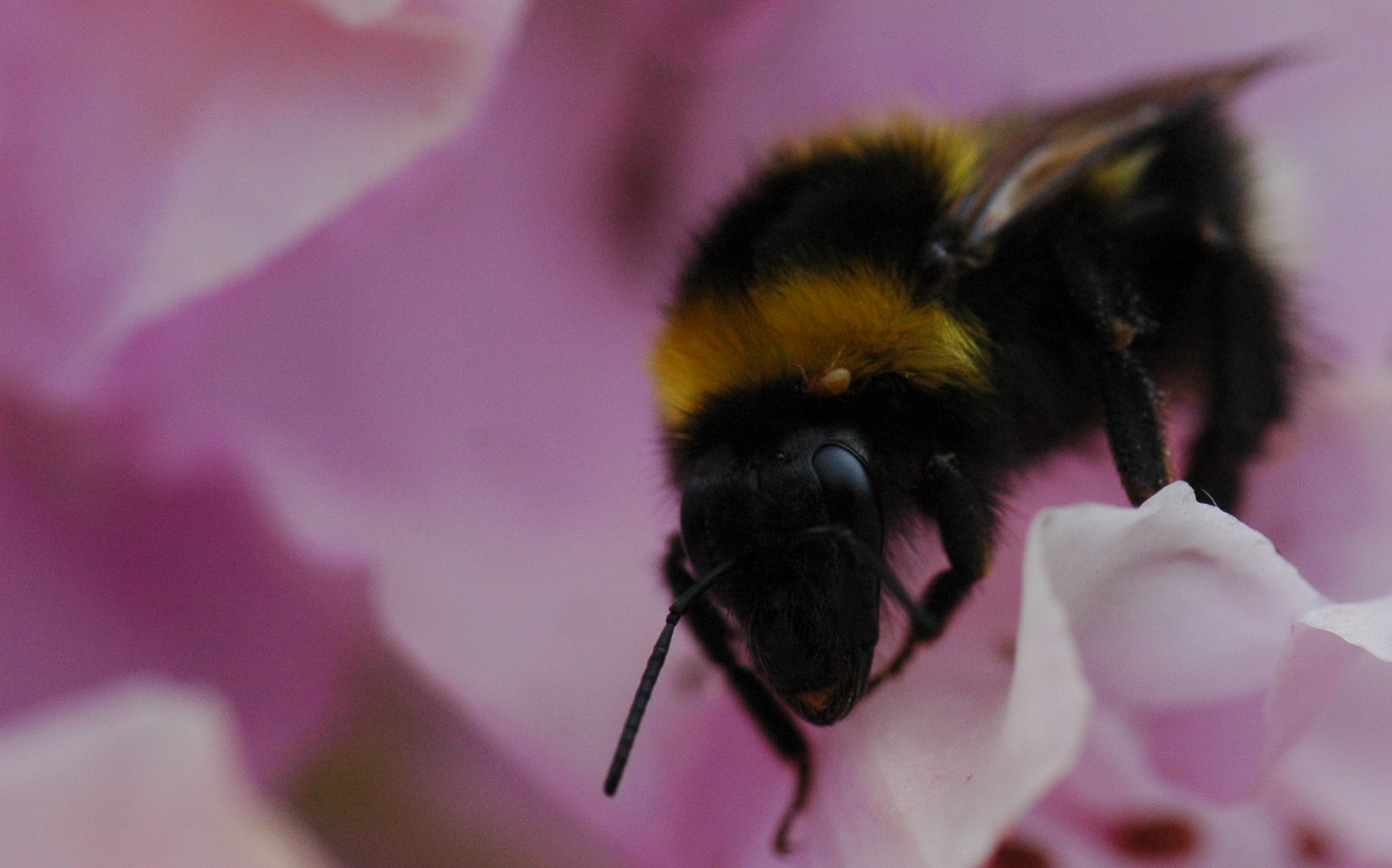 Hummel